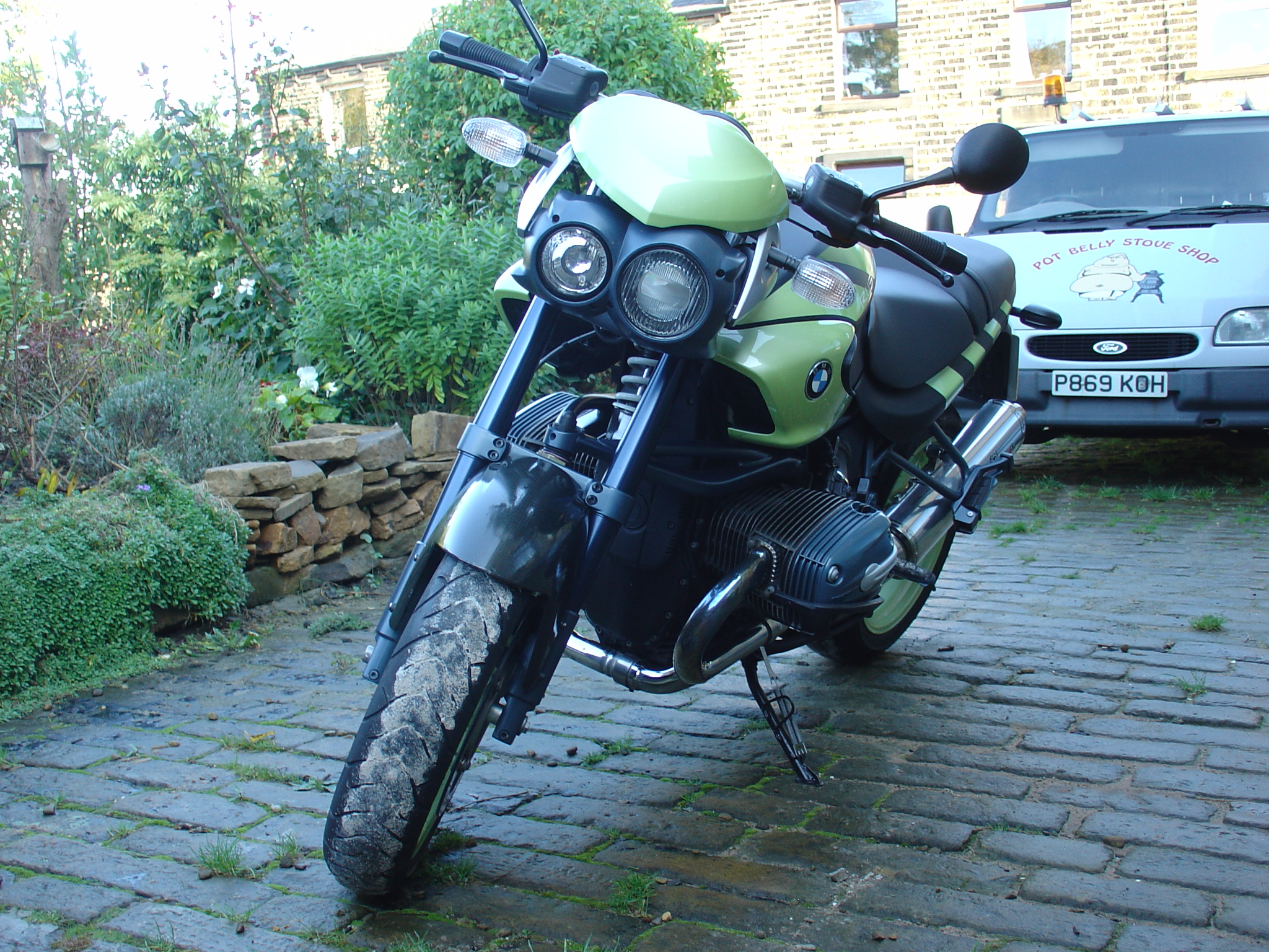 BMW R1150 Rockster